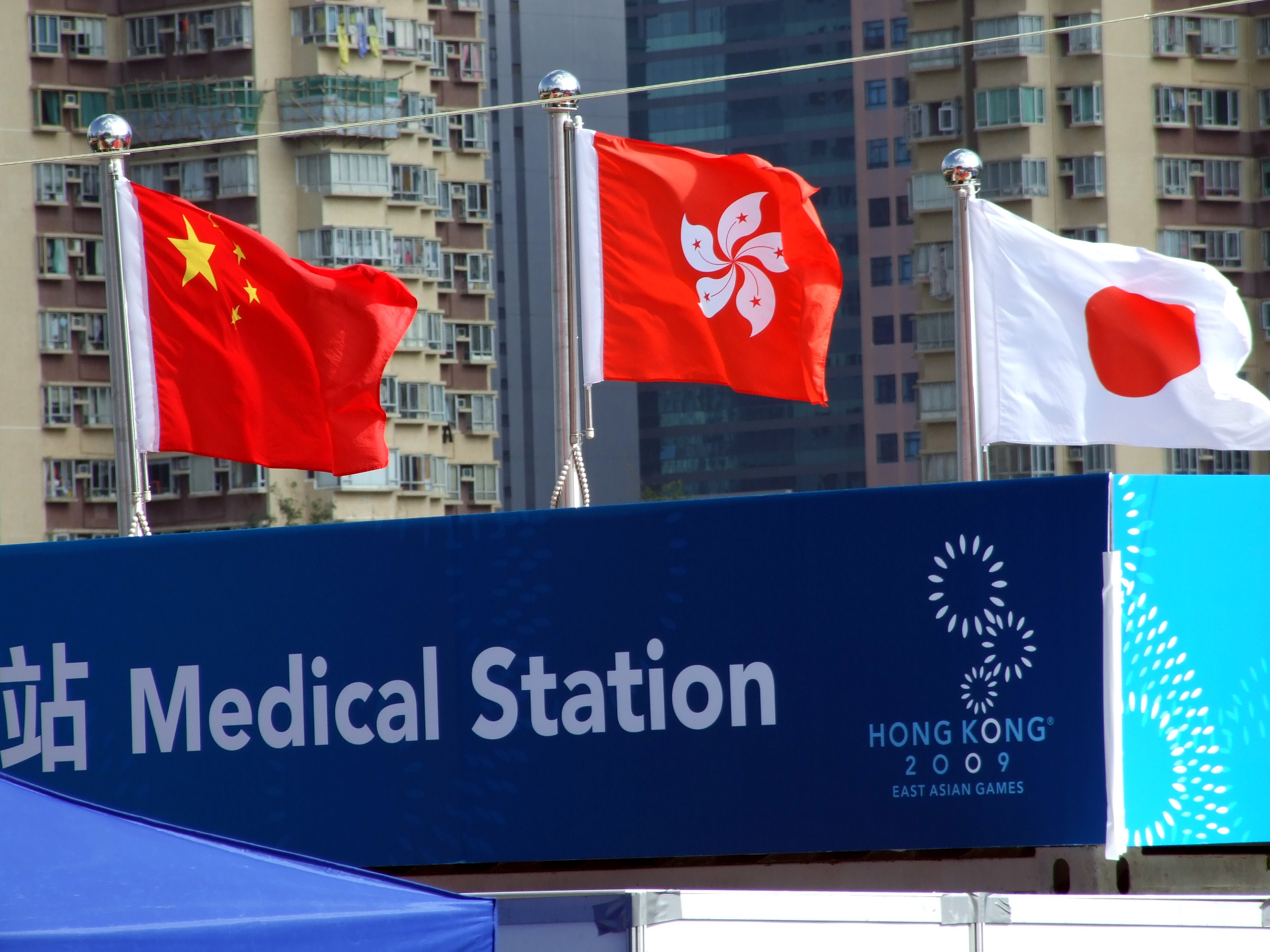 中文（香港）: 2009年東亞運動會香港第11金的升旗禮